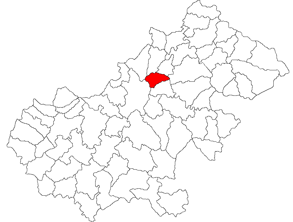 Categorie:Hărţi ale judeţului Satu Mare